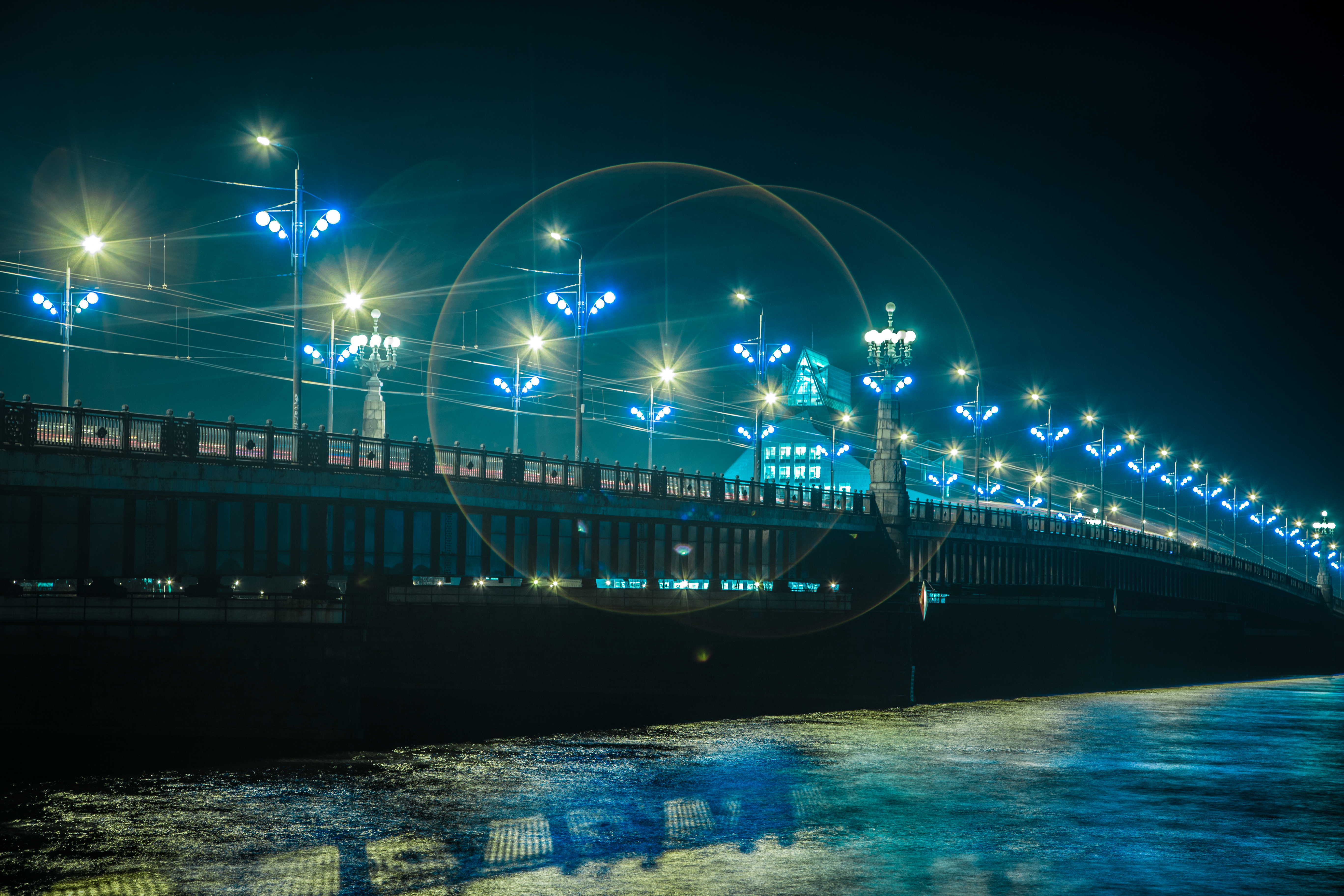 Каменный мост (латыш. Akmens tilts) в Риге, вид ночью при свете огней